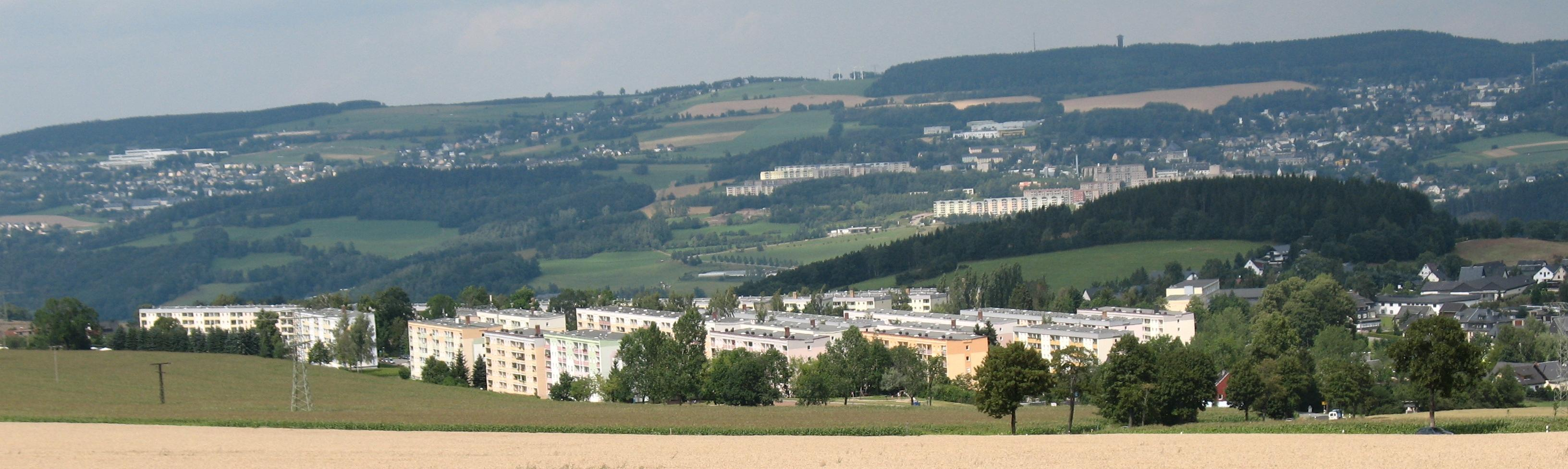 Blick auf die Schwarzenberger Stadtteile Heide und Sonnenleithe